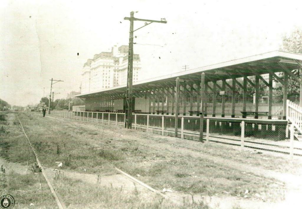 Vista general